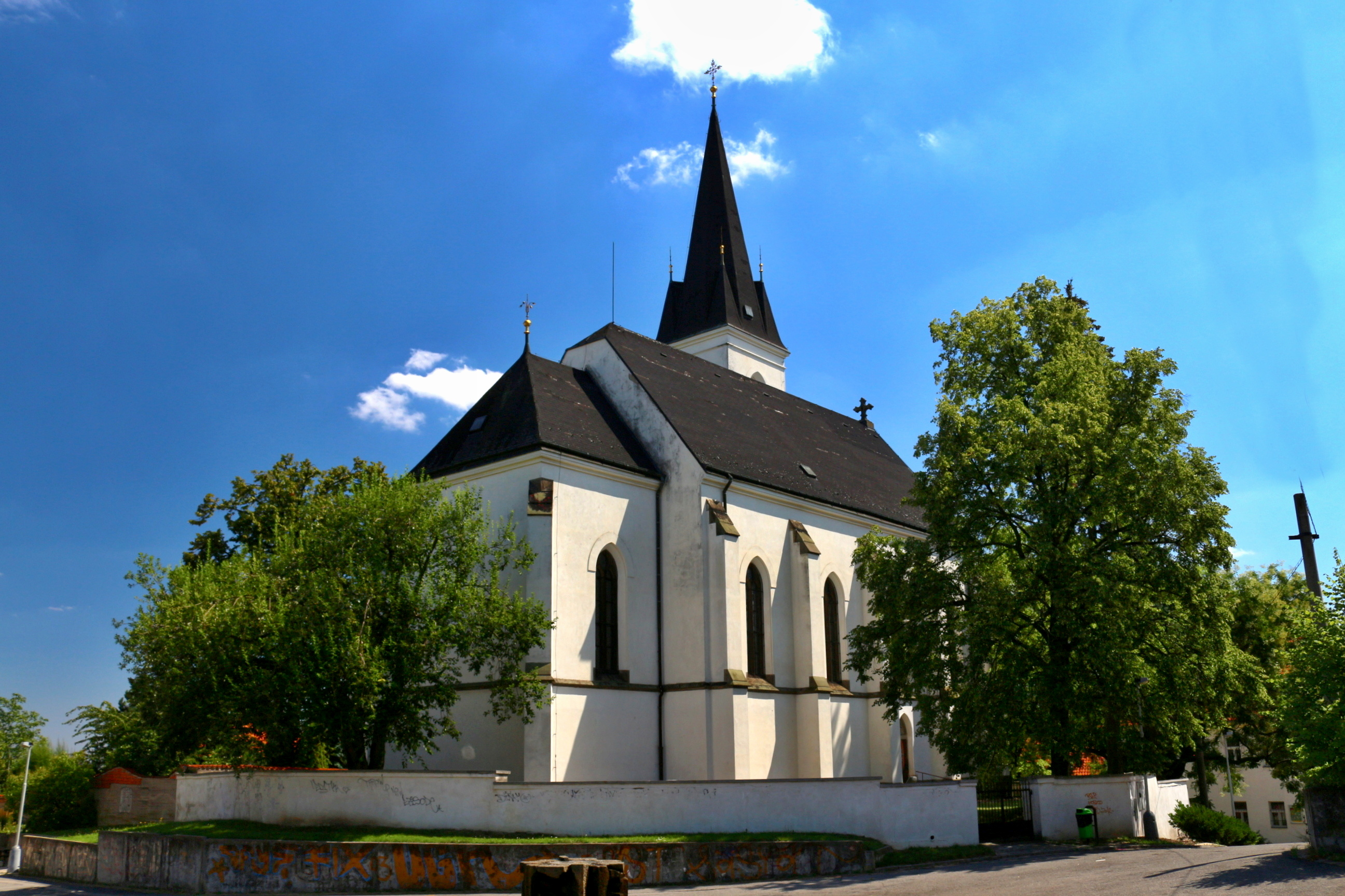 Praha-Stodůlky, kostel sv. Jakuba